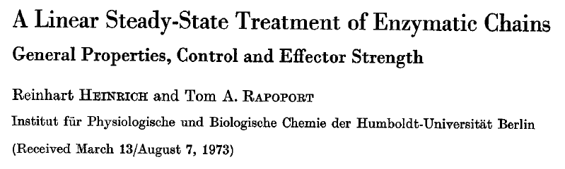 Ausriss aus einer Veröffentlichung von Reinhart Heinrich und Tom Rapoport aus dem Jahr 1974 (European Journal of Biochemistry, 1974, 42:89–95)